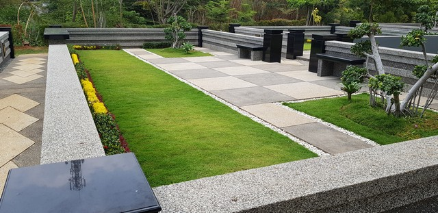 Pemakaman Islam Al -Azhar Memorial Garden Karawang